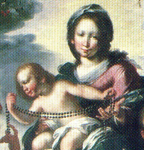 Bernardo Strozzi (1582-1644) Madonna del Rosario (particolare). Parrocchia di S. Martino, Framura. Immagine tratta dall'Agenda Estate 1995 del Comune di Framura. Scanner. Utente:GigiCimaschi